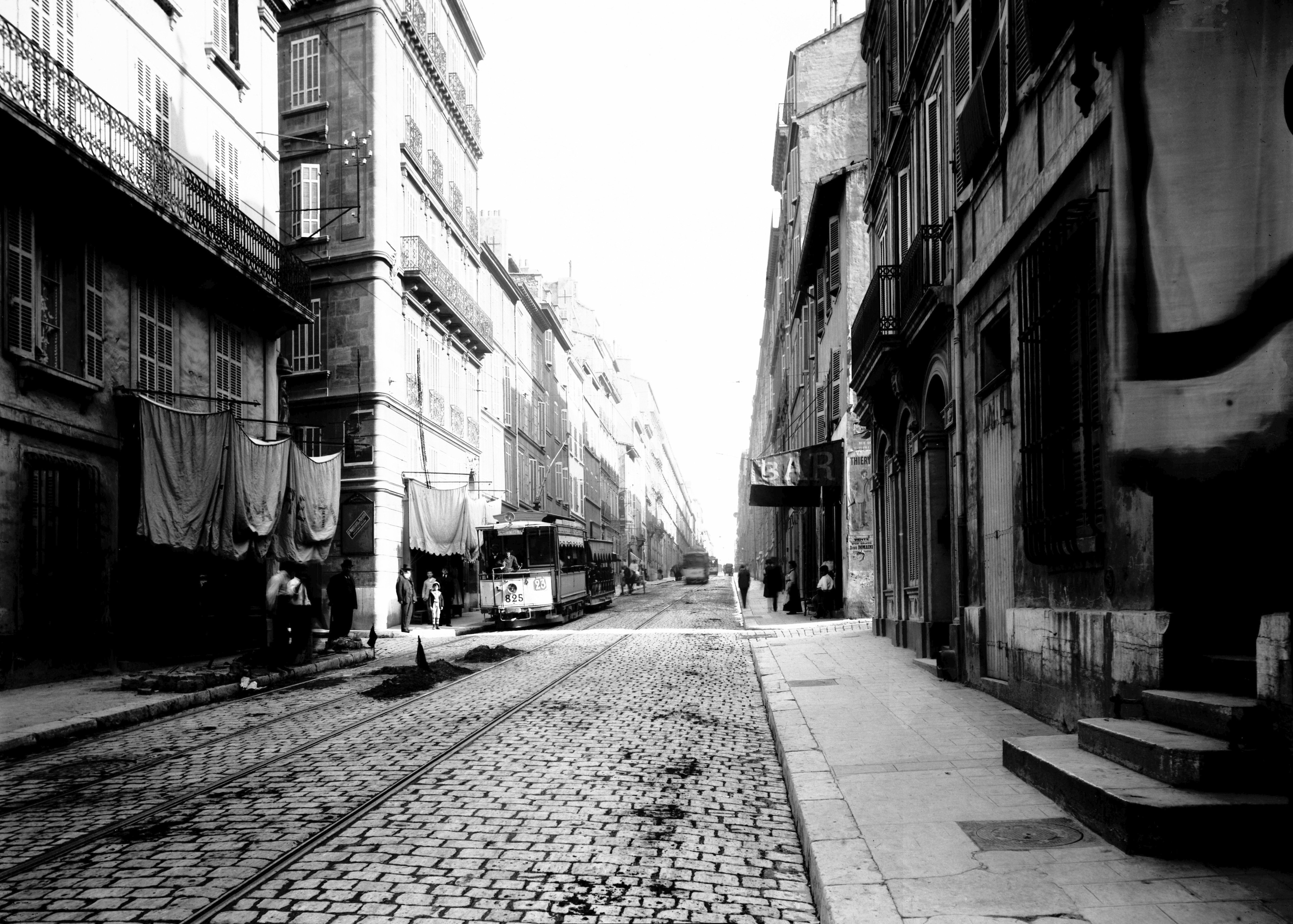 Rue Paradis